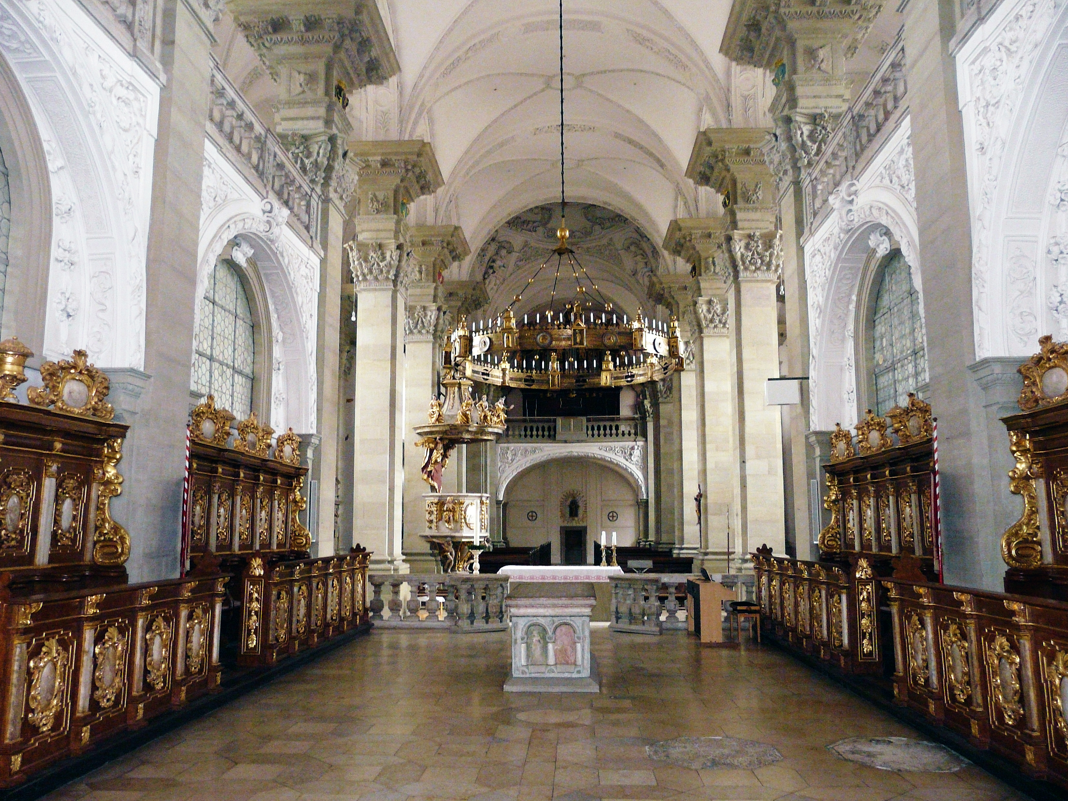 Саркофаг церкви Св. Николая